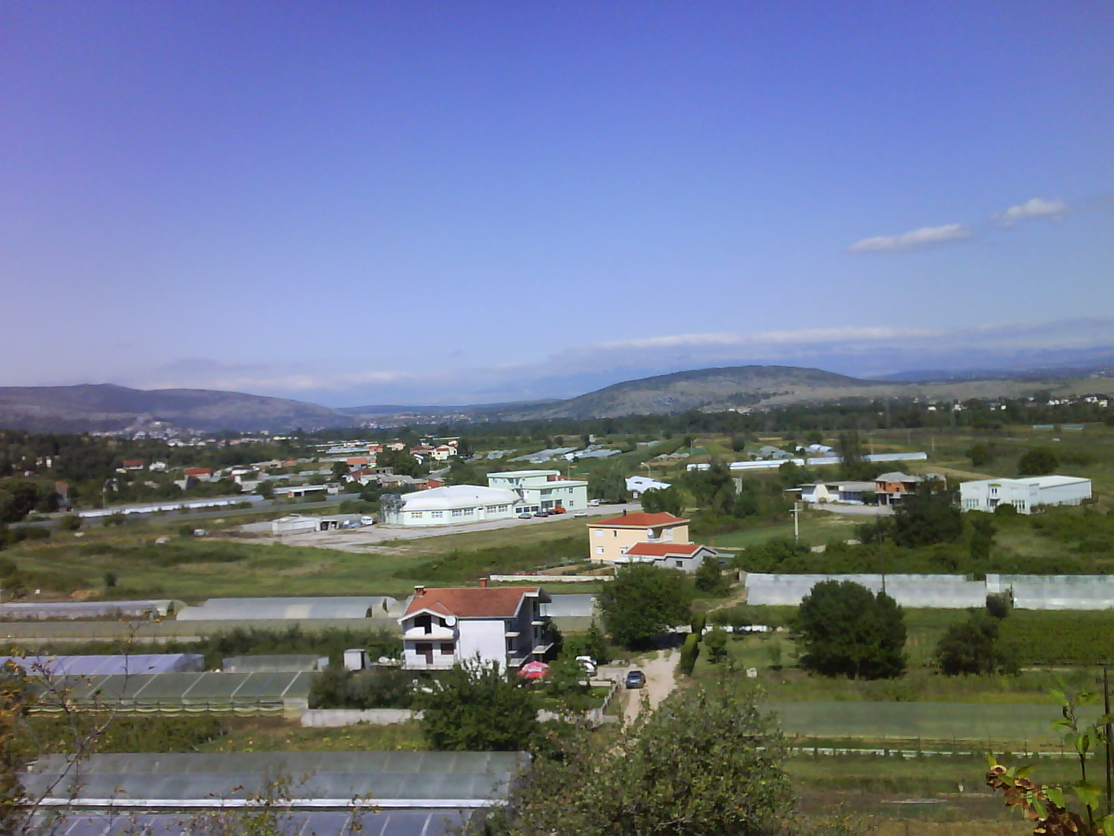 Motel"LAV"